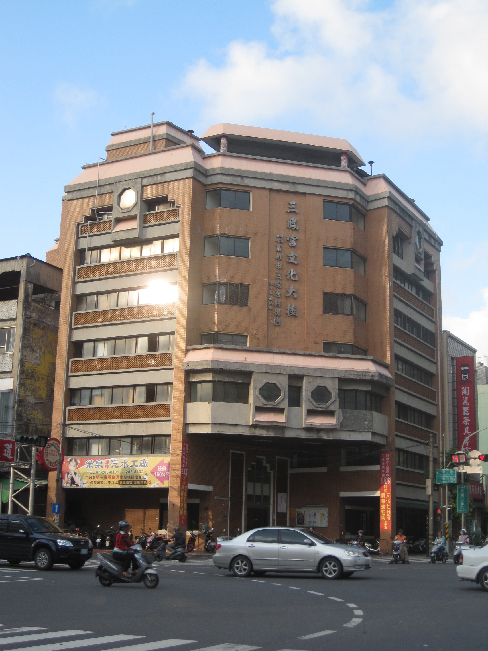 高雄三鳳宮文化大樓